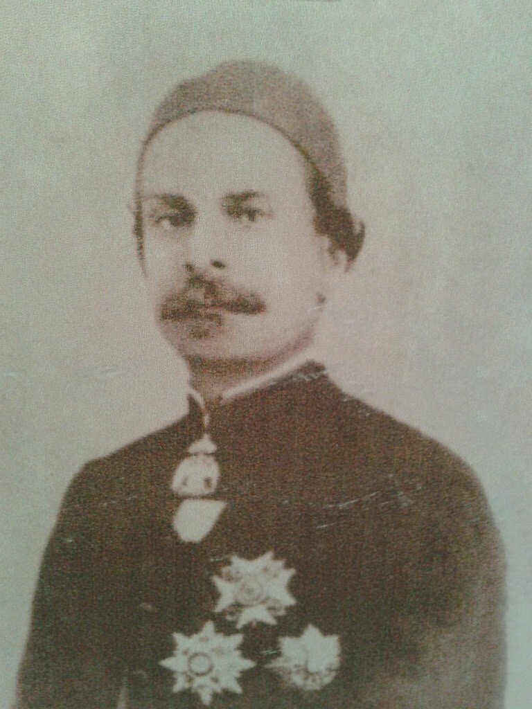 Girolamo de Rada in his youth